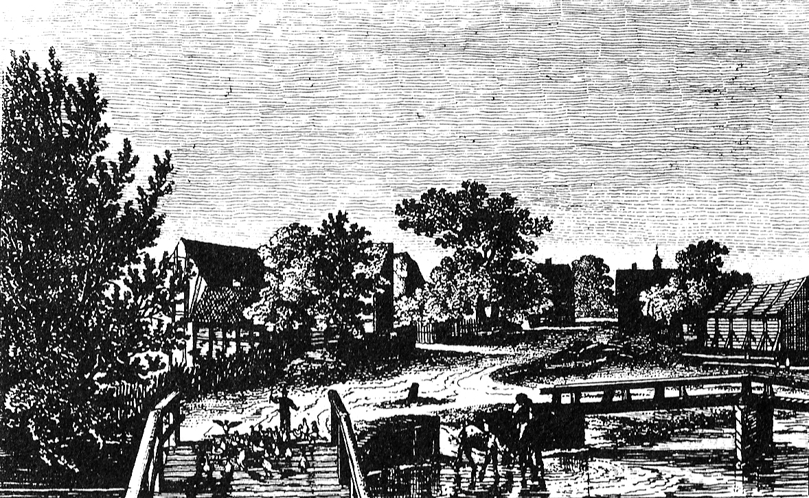 „Zwey Ansichten von Haussen“ – um 1802 (Kupferstich) – Bild: 1/2 (von zwei übereinander angeordneten Bildern)